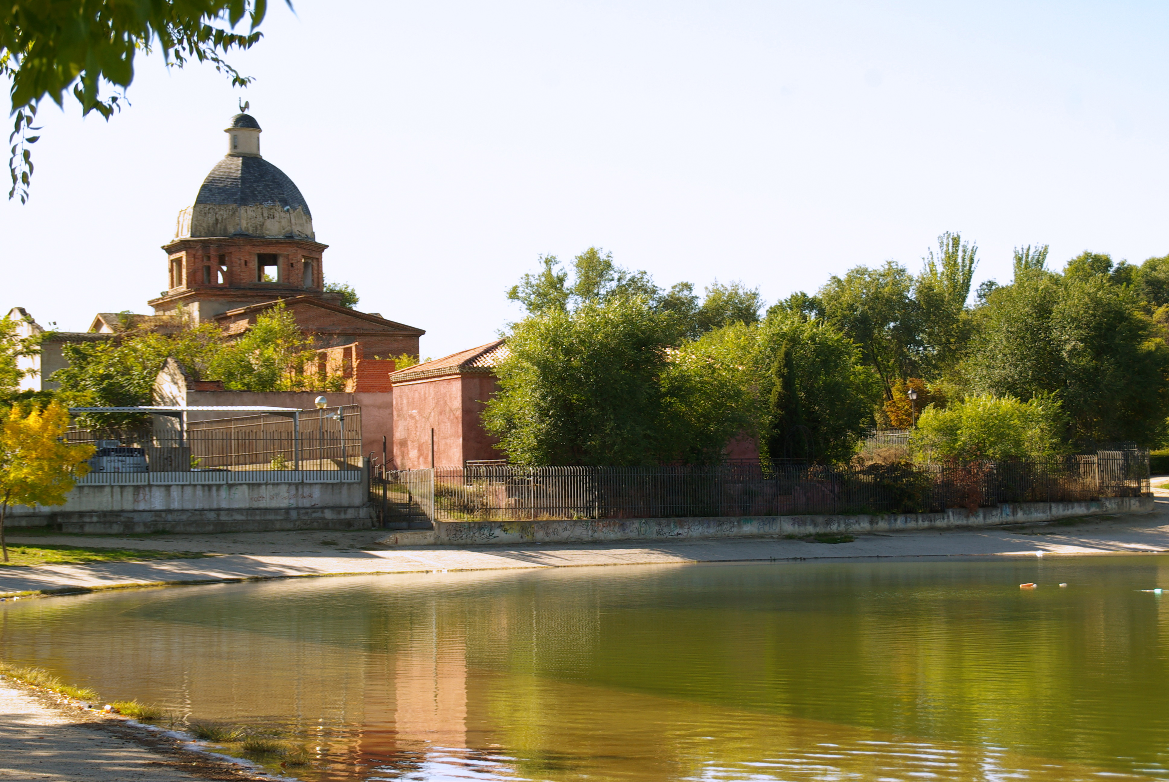 MADRID E.R.U. IGLESIA MARIS STELLA